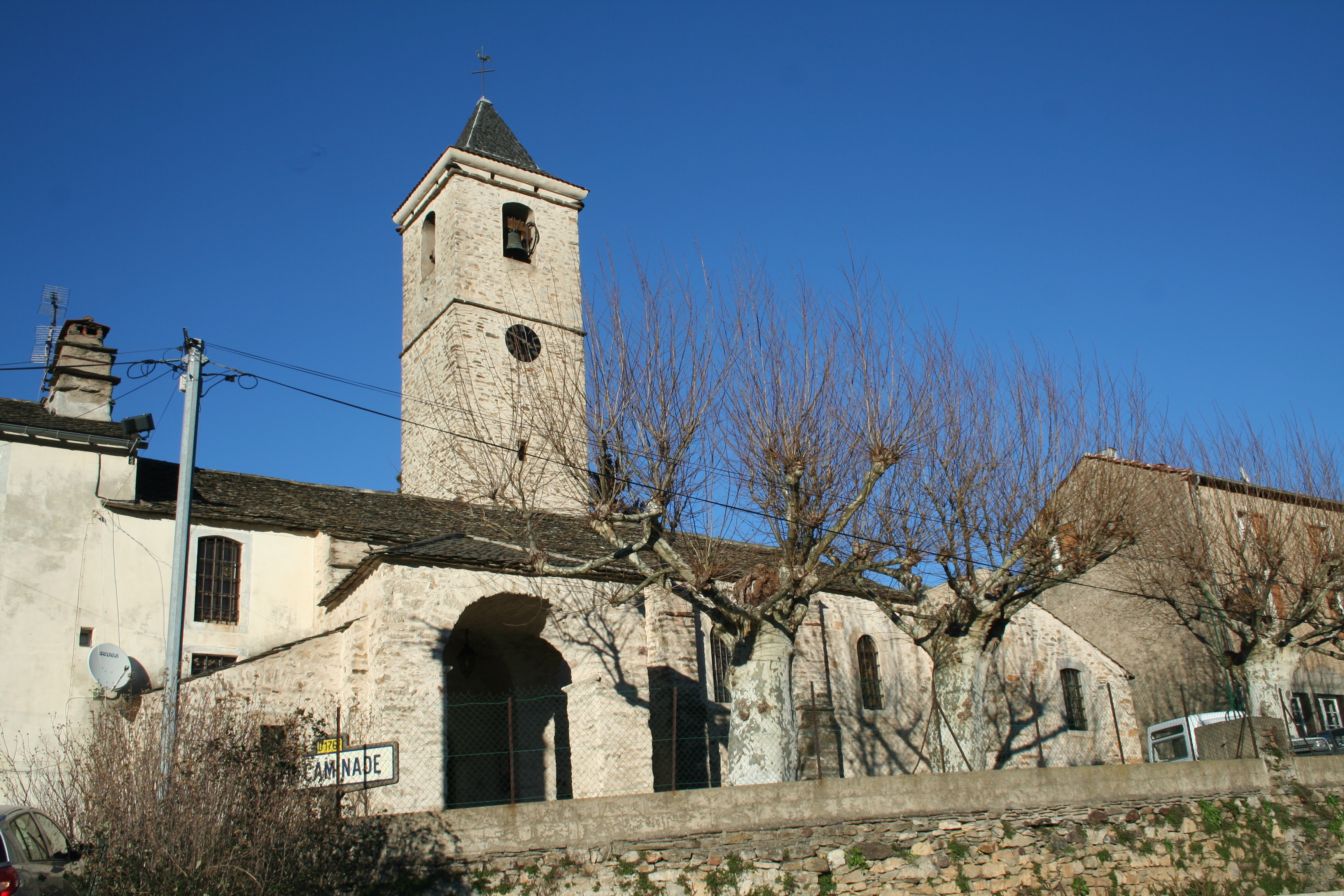 Prémian (Hérault) - église Saint-Sébastien (de la Caminade).